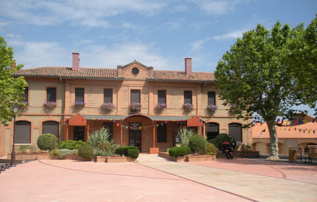 Hôtel de ville de Castelmaurou (Haute-Garonne, France).